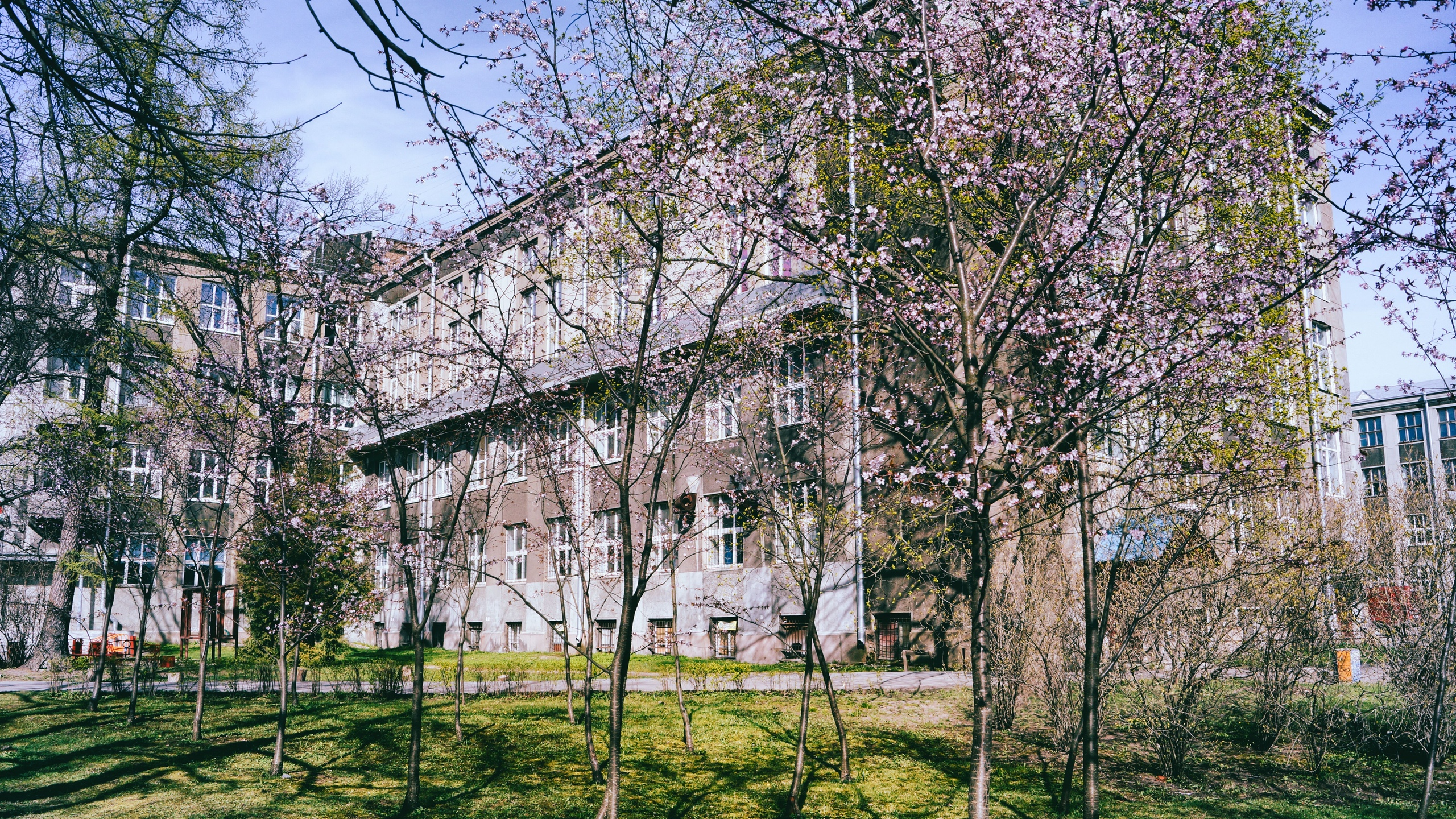 Весна в СПбГЛТУ